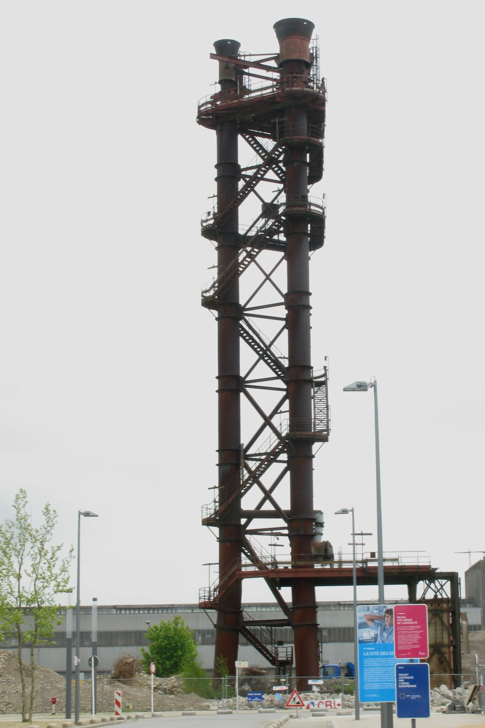 Fakeltuerm op Belval.